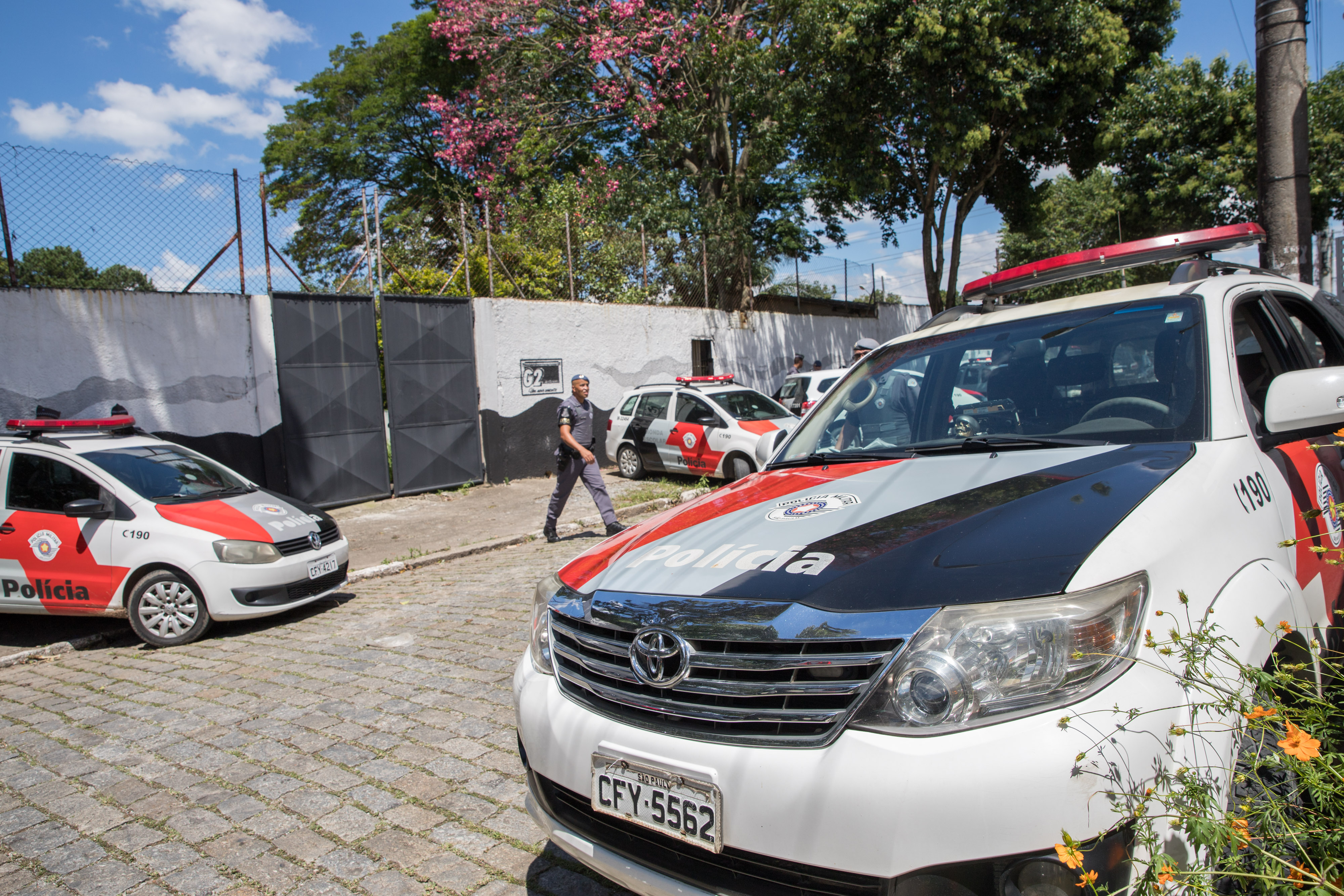 Secretários da Segurança Pública, participam de coletiva de imprensa na Escola Raul Brasil. Local: São Paulo/SP.Data: 13/03/2019 Foto: Governo do Estado de São Paulo